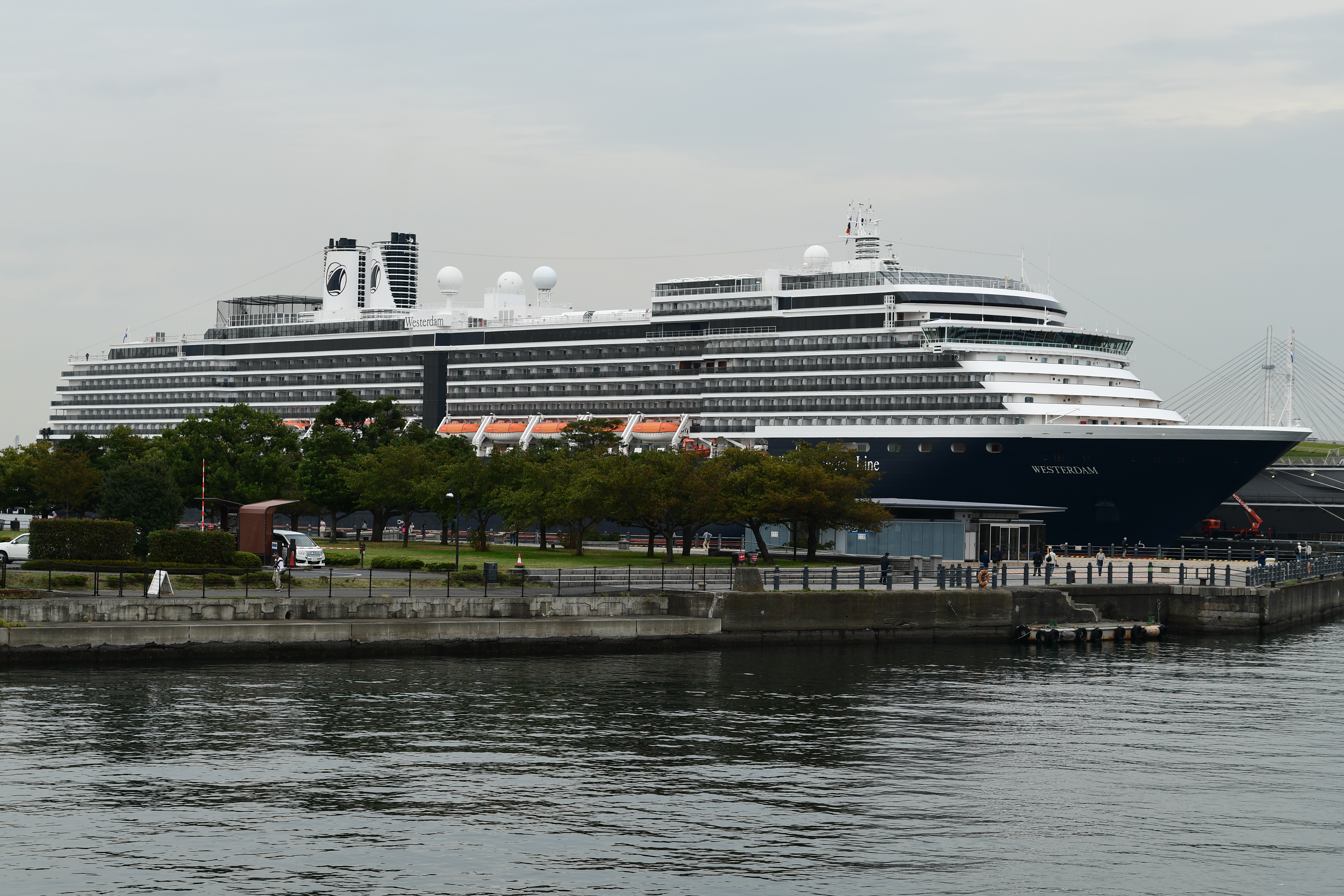 横浜大さん橋国際客船ターミナルに停泊中のウェステルダム